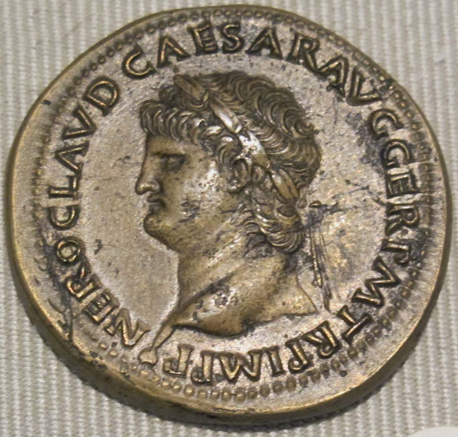 Impero, claudio, sesterzio in oricalco (lione), 42-43 dc